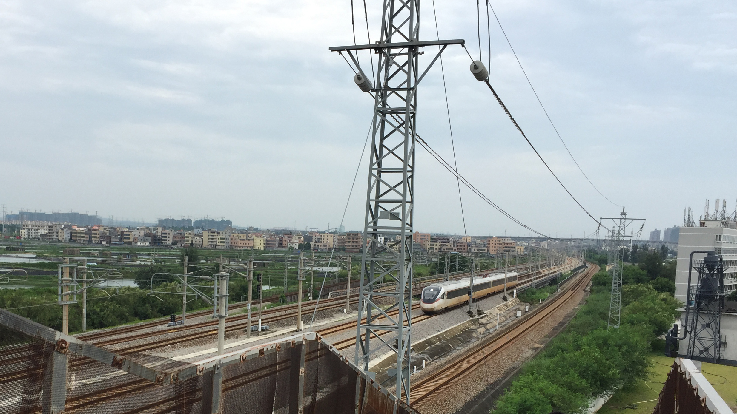 中文（中国大陆）: CJ6 在海南环 于海口站